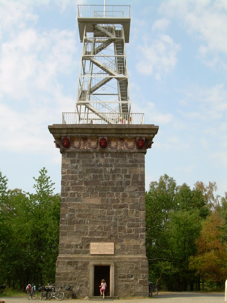 Rytterknægten, Bornholm, Denmark